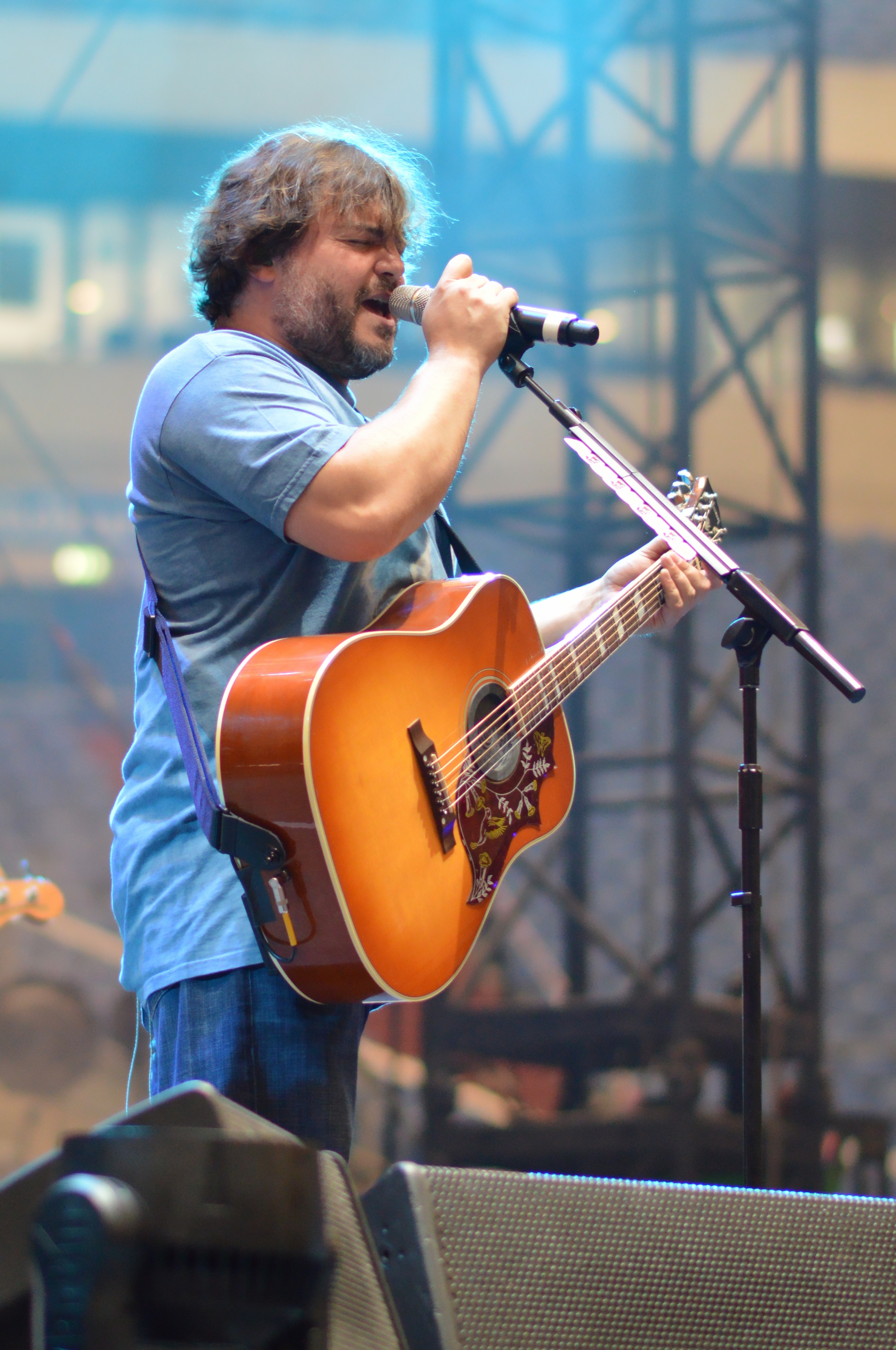 Tenacious_D bei Rock im Pott 2013